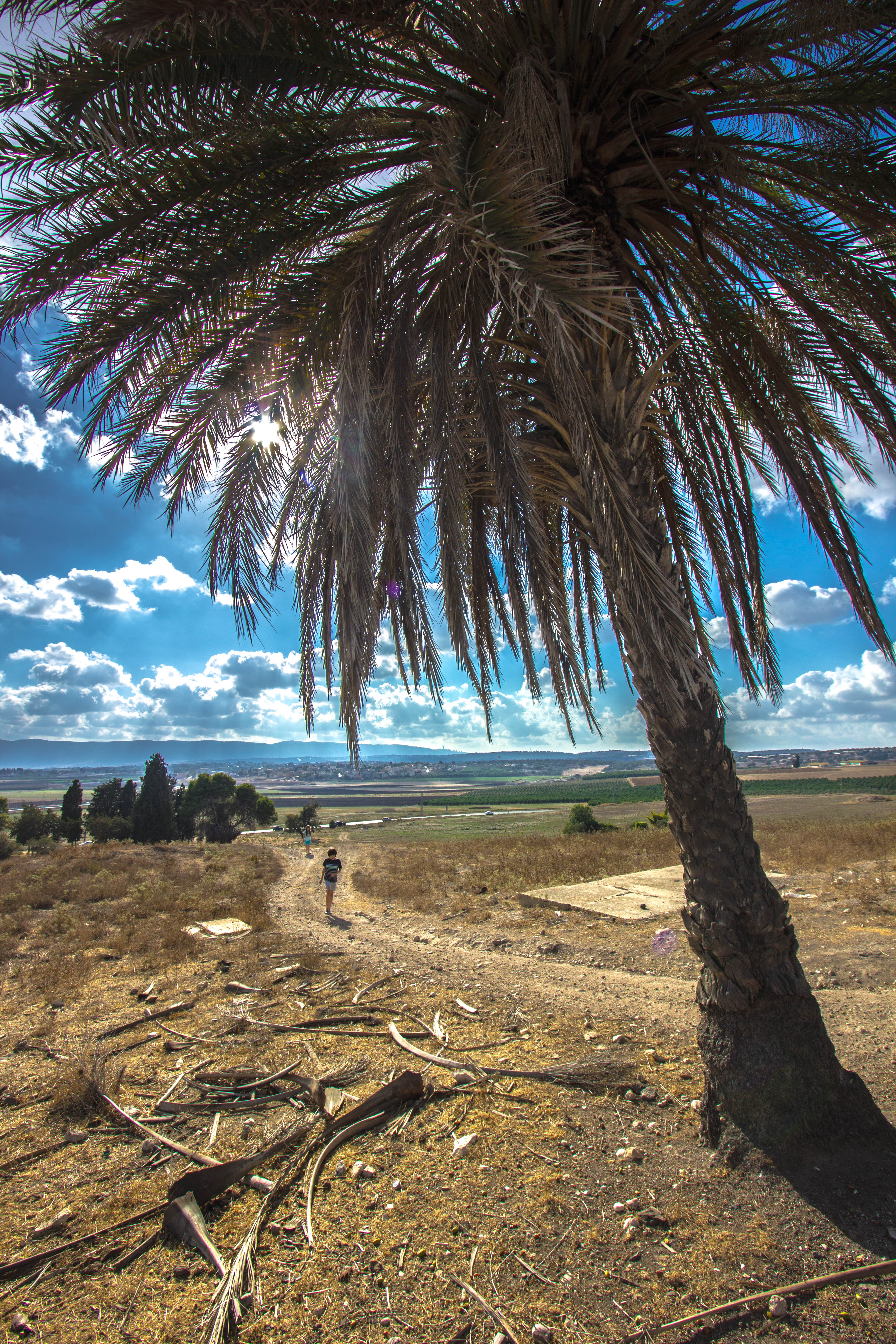 אחת הערים החשובות בצפון ארץ ישראל בעת העתיקה. היא נזכרת בתנ"ך בשם זה, ובתעודות מחוץ למקרא בשם שמע'ון. היא זוהתה בתל הקרוי בערבית "תל סַמוּנִיֶה", מתנשא כ-60 מ' מעל סביבתו, הצלע הצפון מזרחית של התל תלולה, והוא משתפל במתינות לכיוון דרום מערב. התל שוכן מצפון-מזרח למושב נהלל, בגבול עמק יזרעאל והגליל התחתון, ליד כביש הכניסה לתמרת.